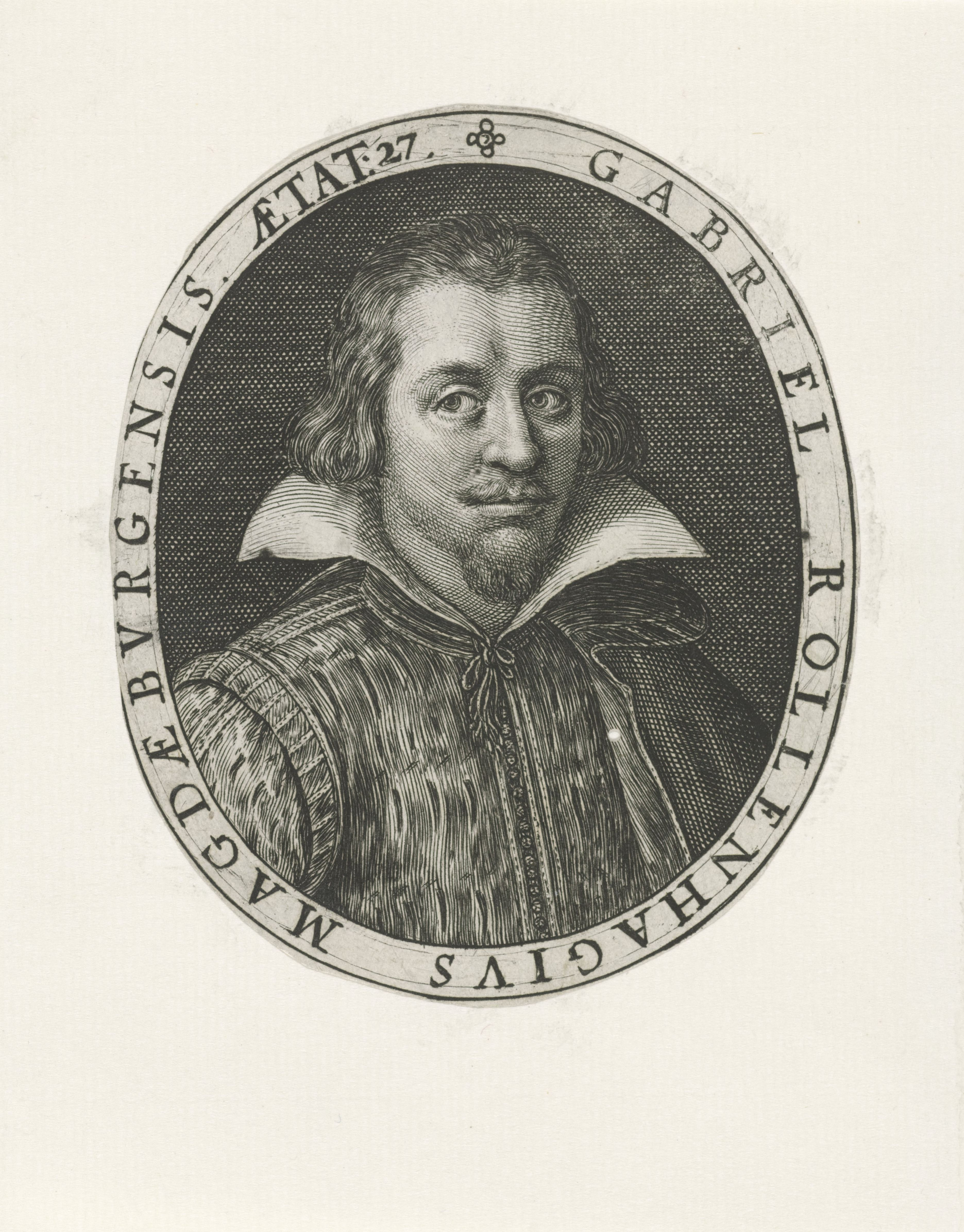 IdentificatieTitel(s): Portret van Gabriel RollenhagenObjecttype: prent boekillustratie Objectnummer: RP-P-OB-16.030Catalogusreferentie: Franken 1344Hollstein Dutch 815Hollstein Dutch 856-bOpschriften / Merken: verzamelaarsmerk, verso, gestempeld: Lugt 2228Omschrijving: Portret van de Duitse dichter Gabriel Rollenhagen, op 27-jarige leeftijd.VervaardigingVervaardiger: prentmaker: Crispijn van de Passe (I)Plaats vervaardiging: UtrechtDatering: 1613Fysieke kenmerken: gravure; boekdruk versoMateriaal: papier Techniek: graveren (drukprocedé) / boekdrukAfmetingen: blad: h 104 mm (ovaal) × b 86 mm (ovaal)ToelichtingPrent uit: G. Rollenhagen, Nucleus Emblematum. Arnhem: Jan Jansz., 1613.OnderwerpWie: Gabriel RollenhagenVerwerving en rechtenVerwerving: onbekend 1991Copyright: Publiek domein